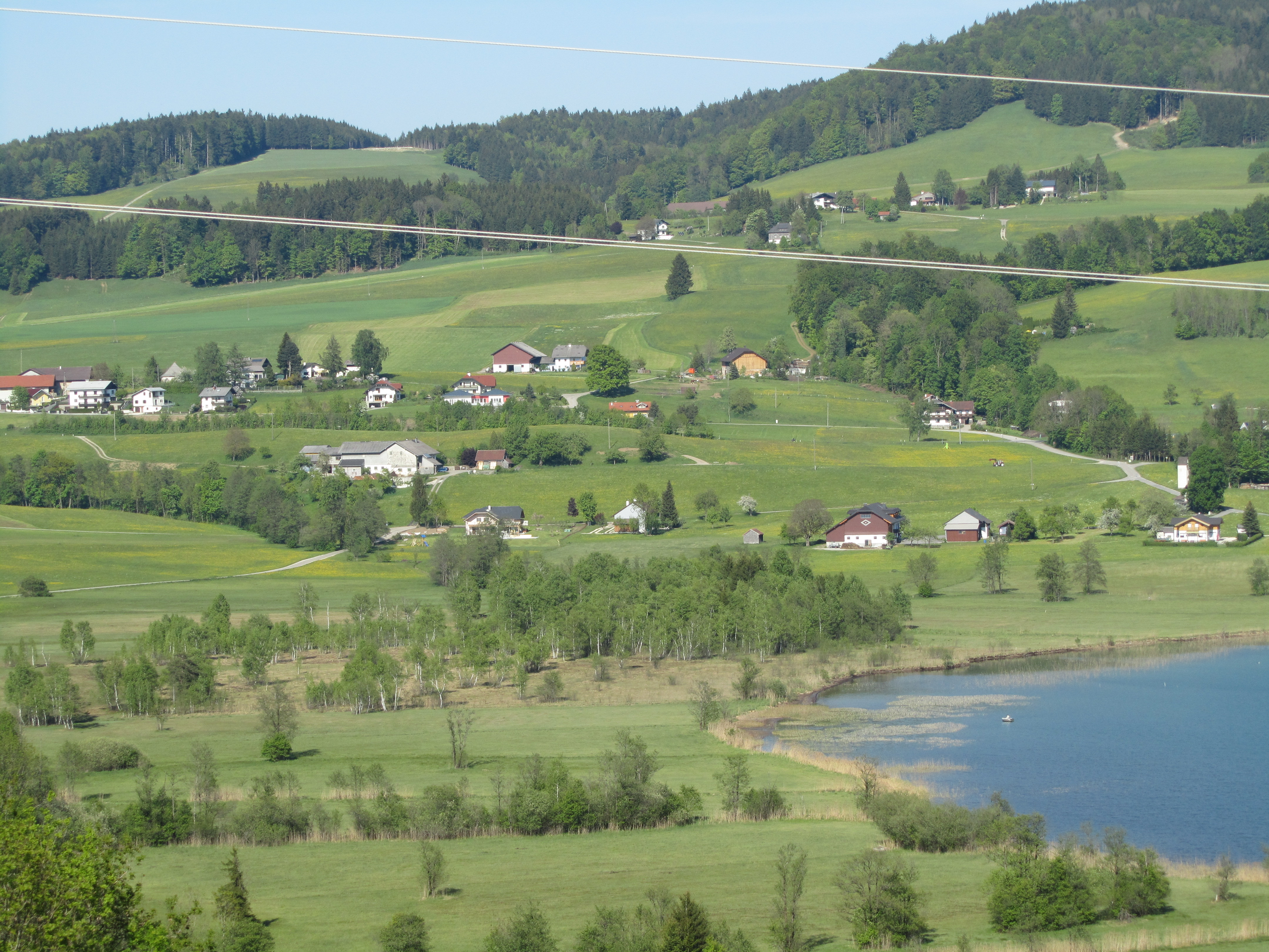 Irrsee-Moore, Nordmoor Gemeinde Oberhofen am Irrsee This media shows the nature reserve in Upper Austria with the ID n109.